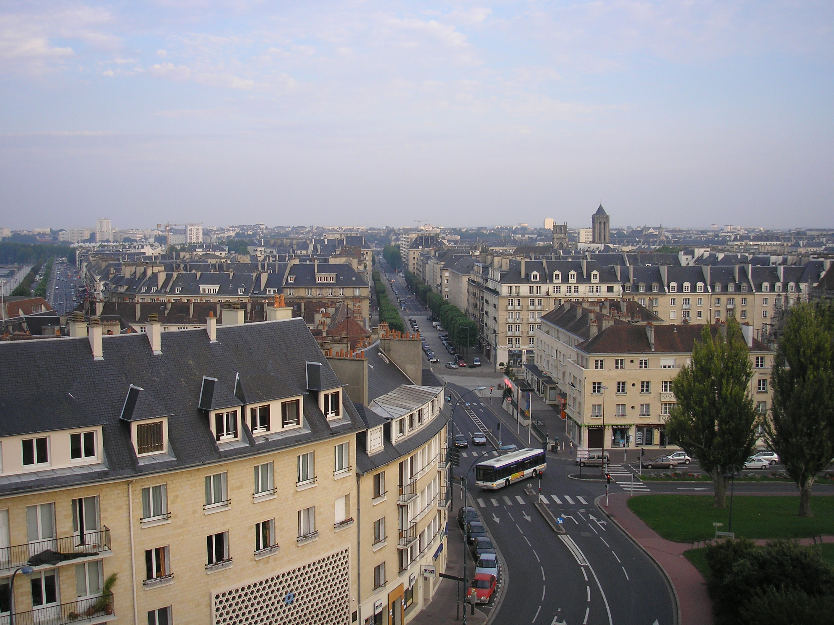 Caen (Normandie, France). L'avenue du 6 Juin, vue depuis le château.